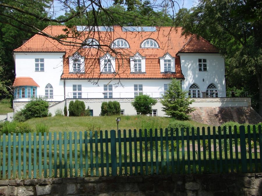 Baudenkmal in der Landhaussiedlung Wilhelmshorst